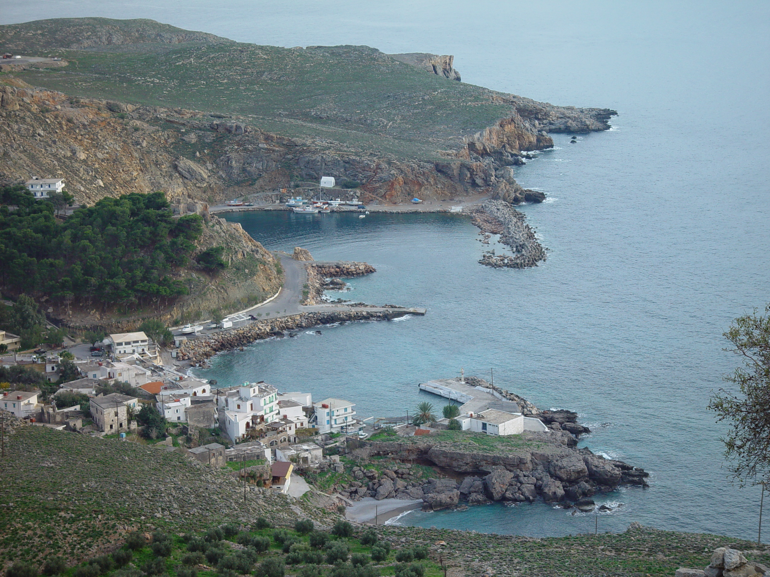 Erno Verhoeven Het dorp Chora Sfakion, Kreta, December 2002